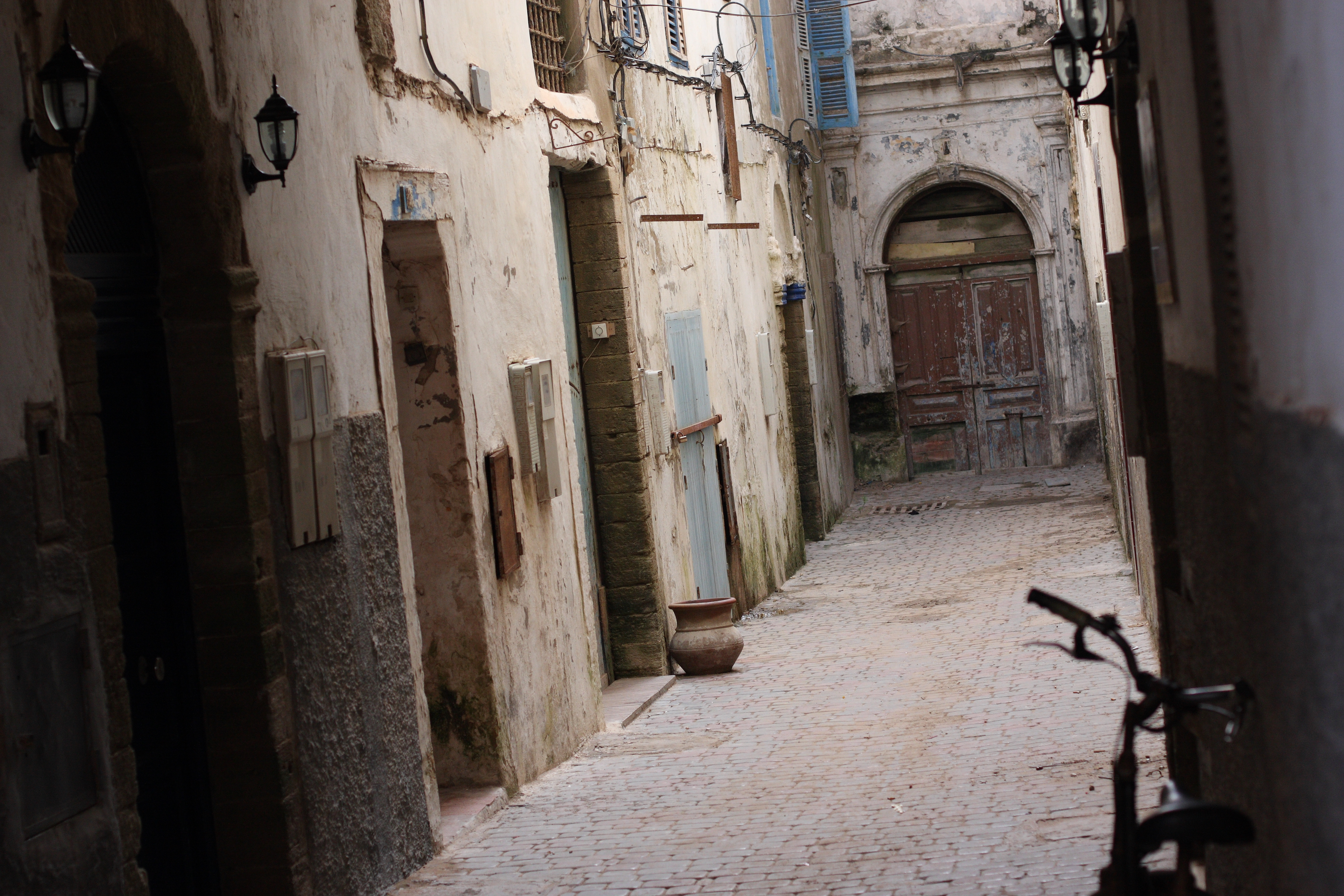 Essaouira, Morocco